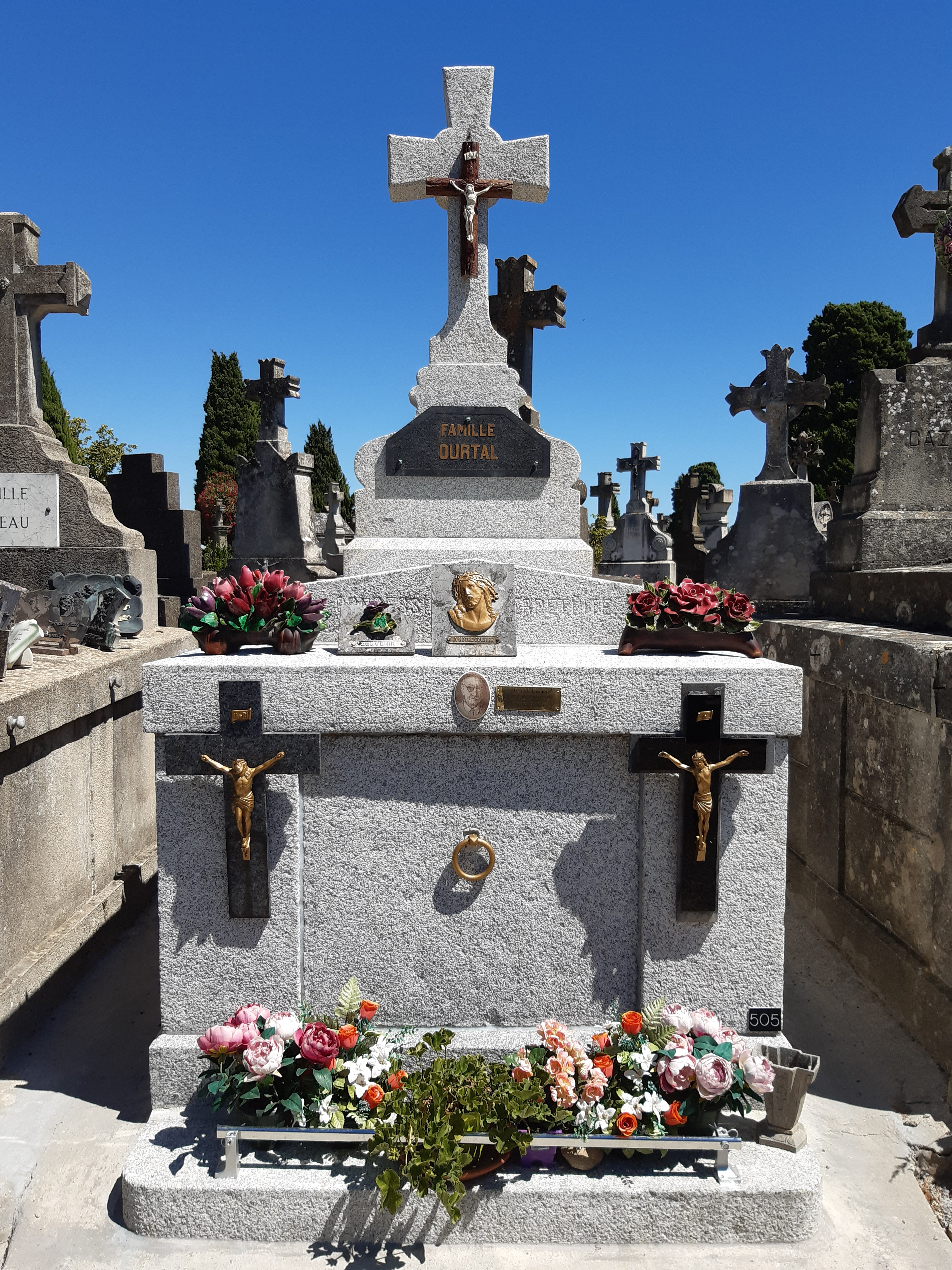 La tombe du peintre, Albert Ourtal, au cimetière Saint-Michel à Carcassonne.